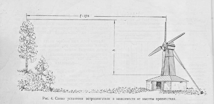 Малюнок розміщення млина